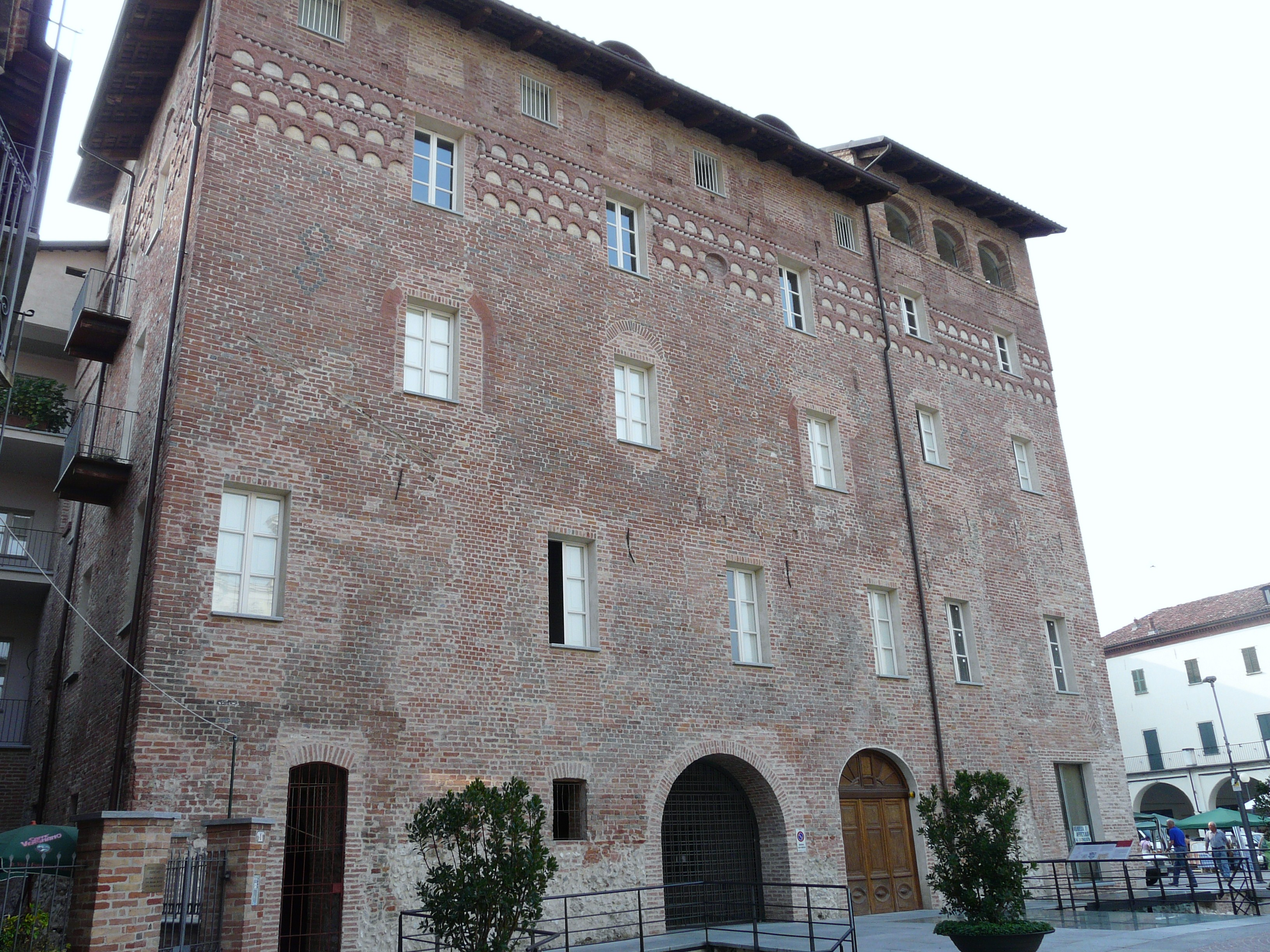 Palazzo Marro, Alba, Piemonte, Italia